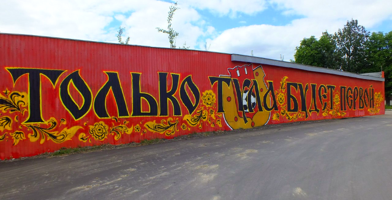 Граффити болельщиков